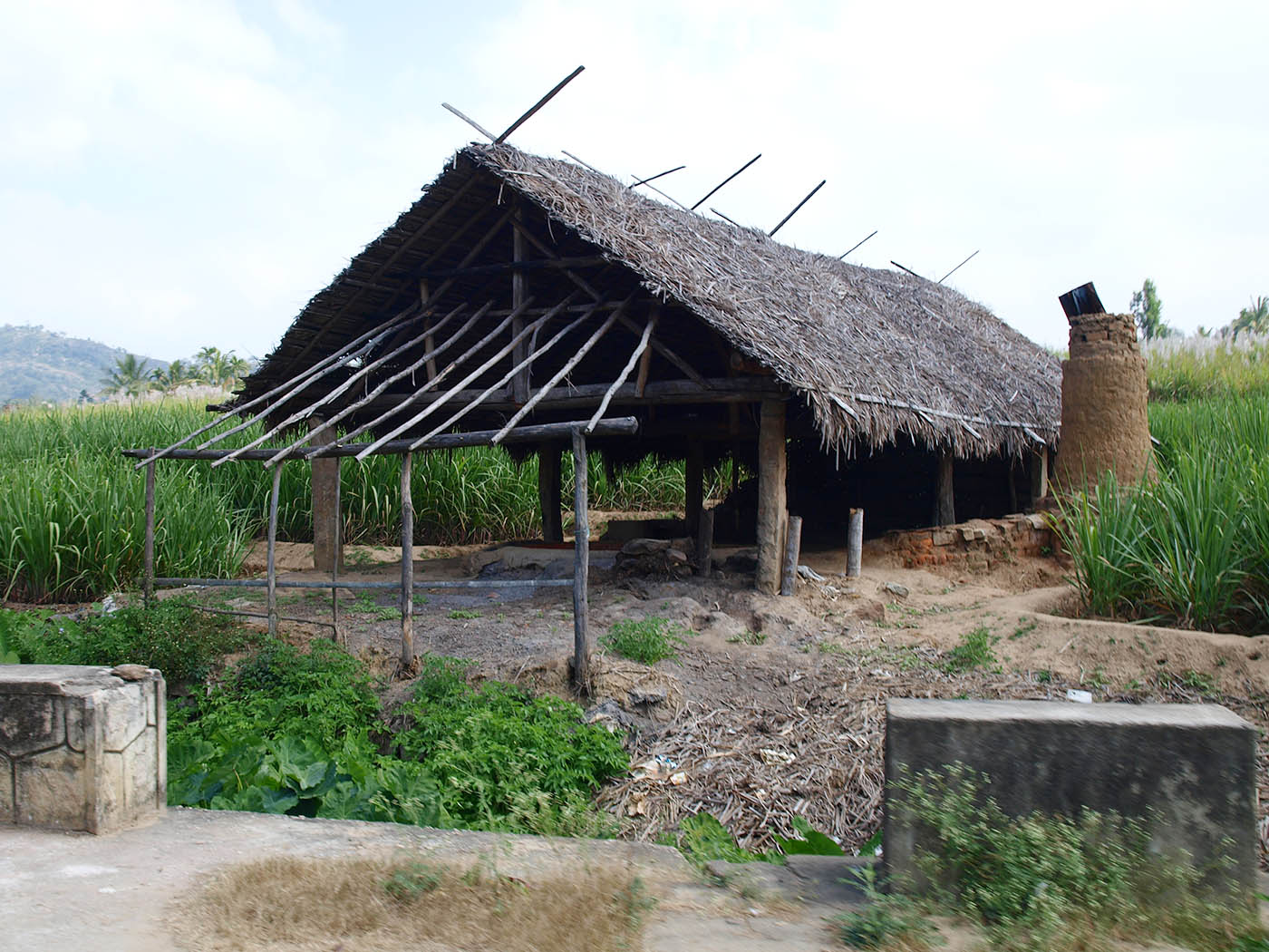 മറയൂരിലെ ഒരു ശർക്കര നിർമാണ കേന്ദ്രം